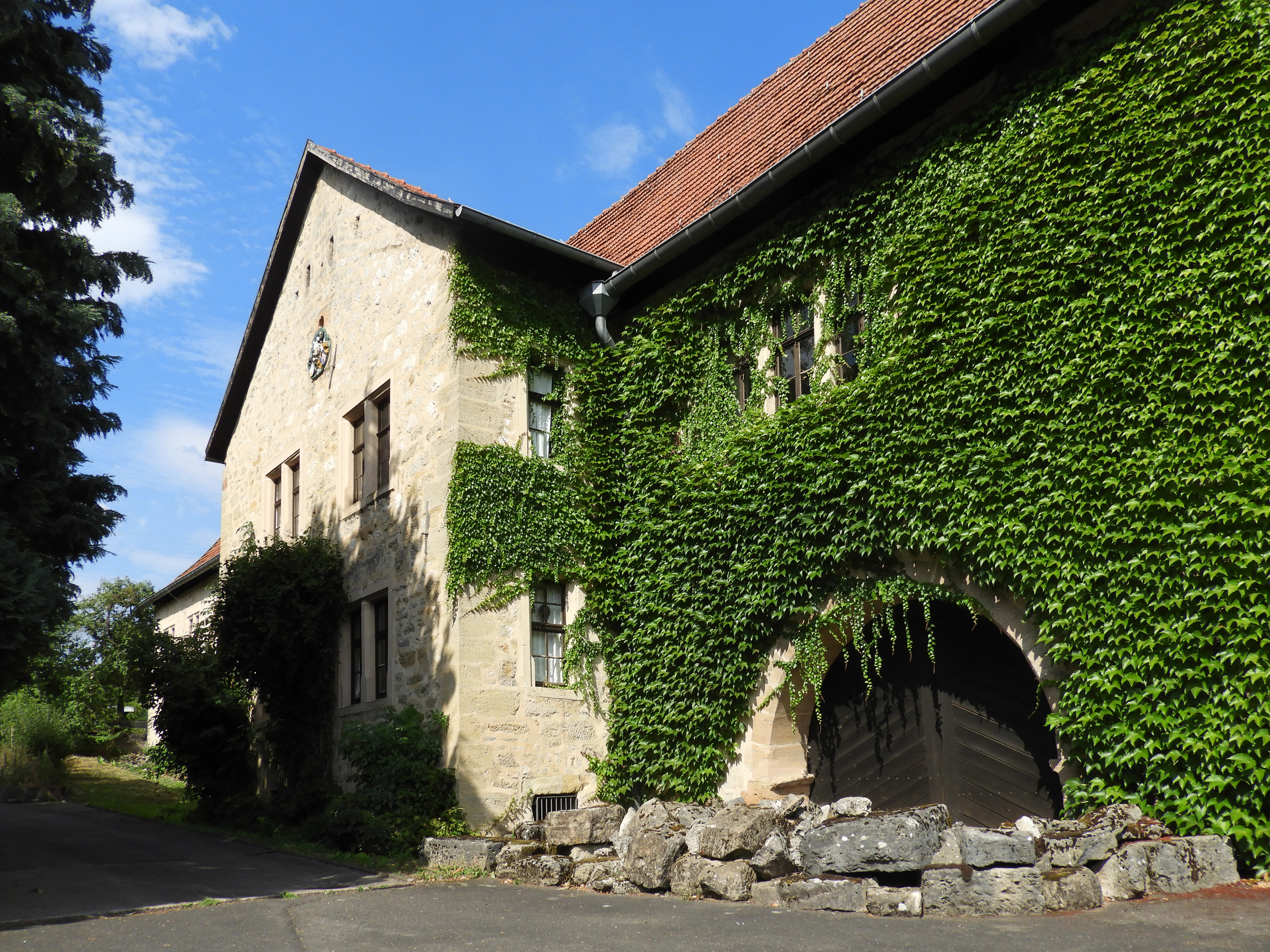 Die Ostseite des Gutshauses. Das ehemalige Schloss der Herren von Capellan steht am westlichen Ortsrand Lüderbachs. Das um 1560 erbaute Gutshaus erhebt sich in massivem Mauerwerk über einem längsrechteckigen Grundriss in zwei Geschossen mit einem in der Mittelachse eingefügten Querriegel, der das Treppenhaus beherbergt. Das Schloss ist ein Kulturdenkmal aus künstlerischen, geschichtlichen und städtebaulichen Gründen. Lüderbach ist ein Ortsteil der Gemeinde Ringgau im nordhessischen Werra-Meißner-Kreis.